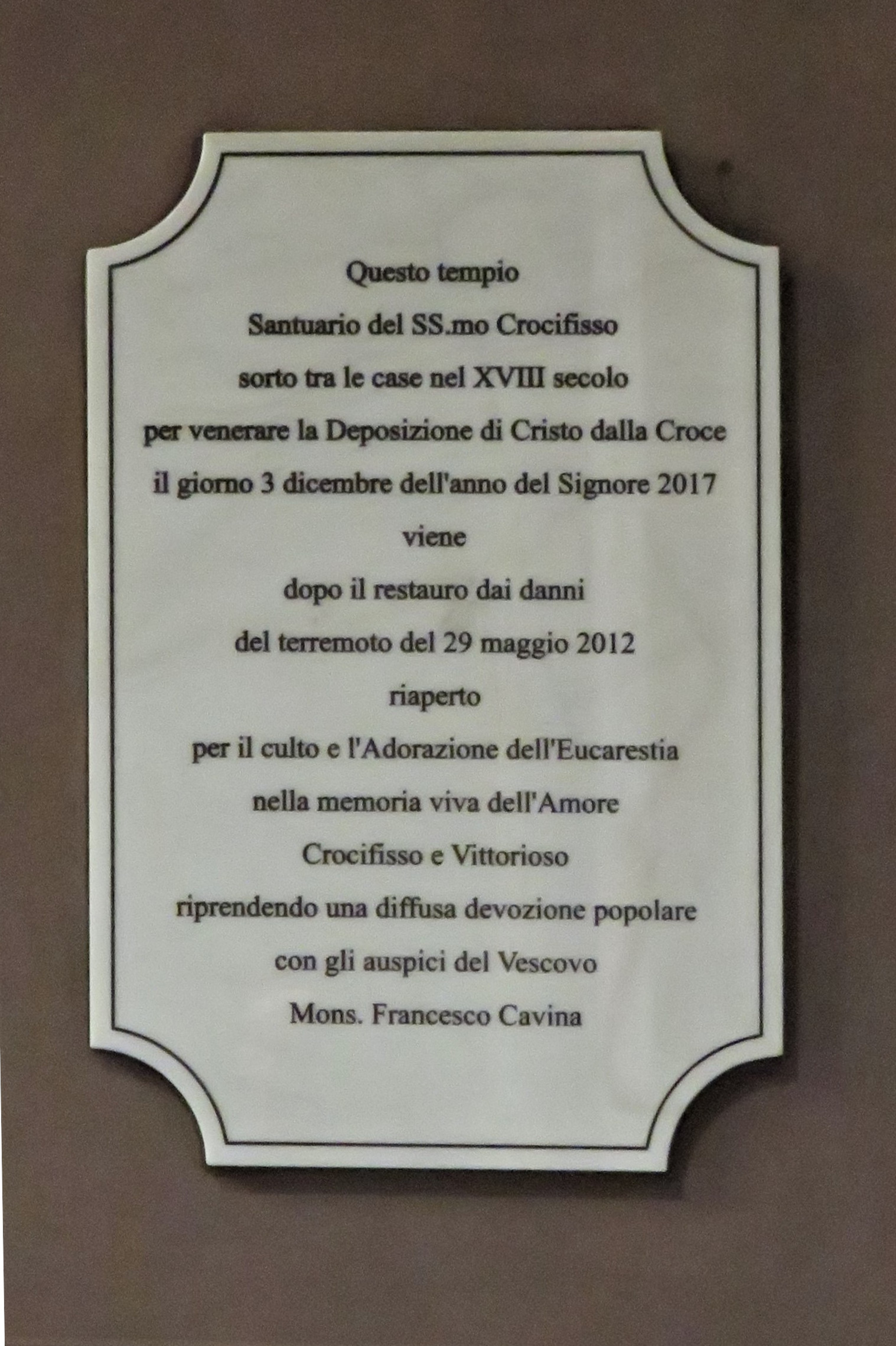 Carpi. Chiesa del Santissimo Crocifisso. Epigrafe per la riapertura dopo il sisma del 2012